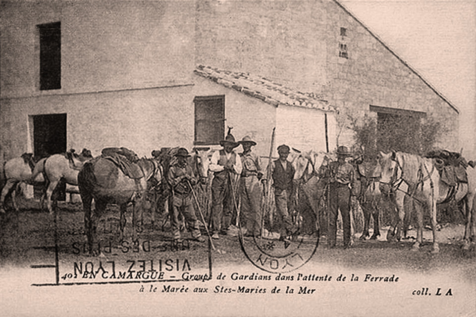 Mas de l'Amarée de Folco de Baroncelli-Javon en attente de la ferrade